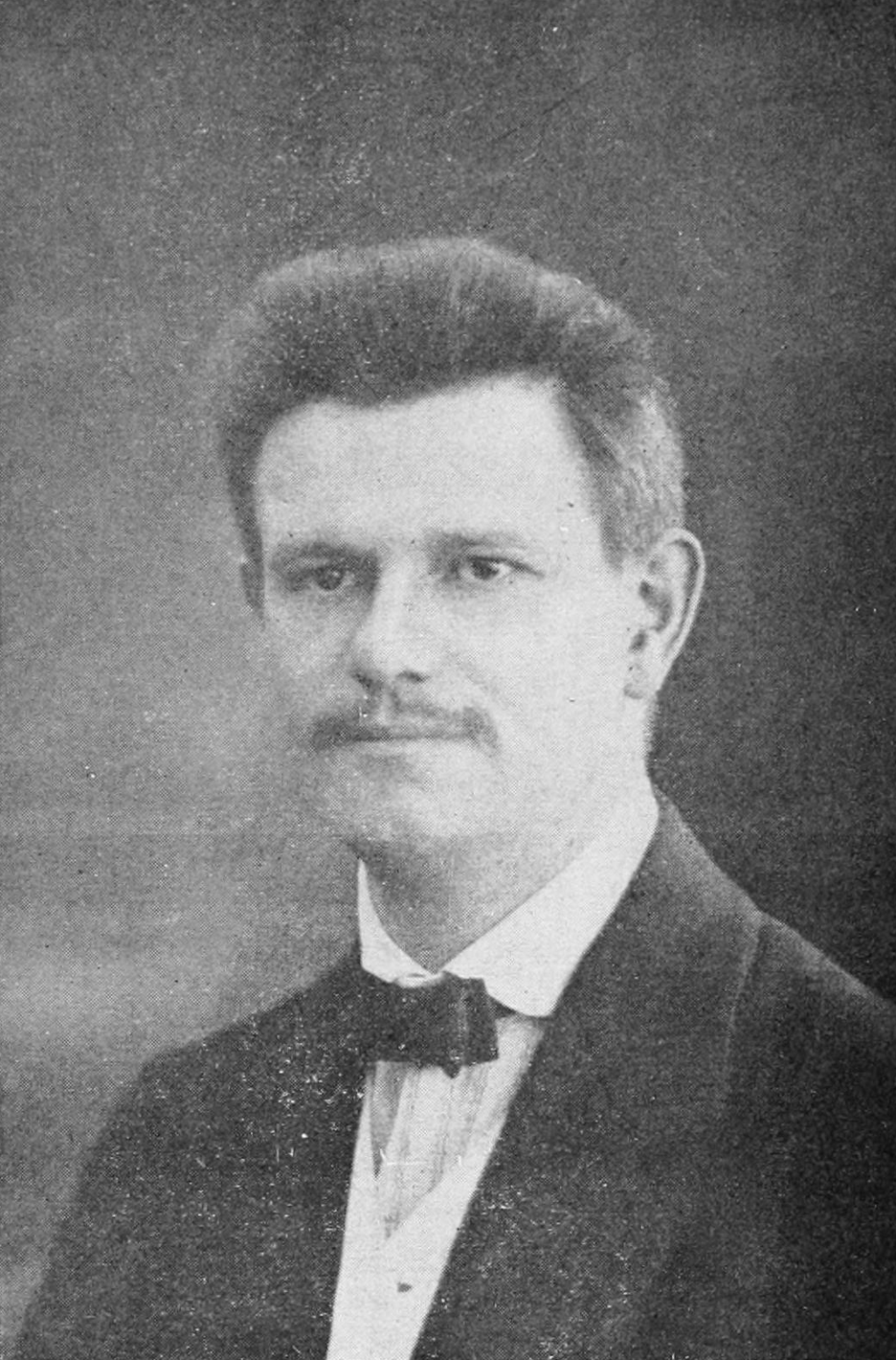 Hornjoserbsce: Hajno Jordan (1882–1917); serbski wučer, mjenowědnik a kulturny prócowar.